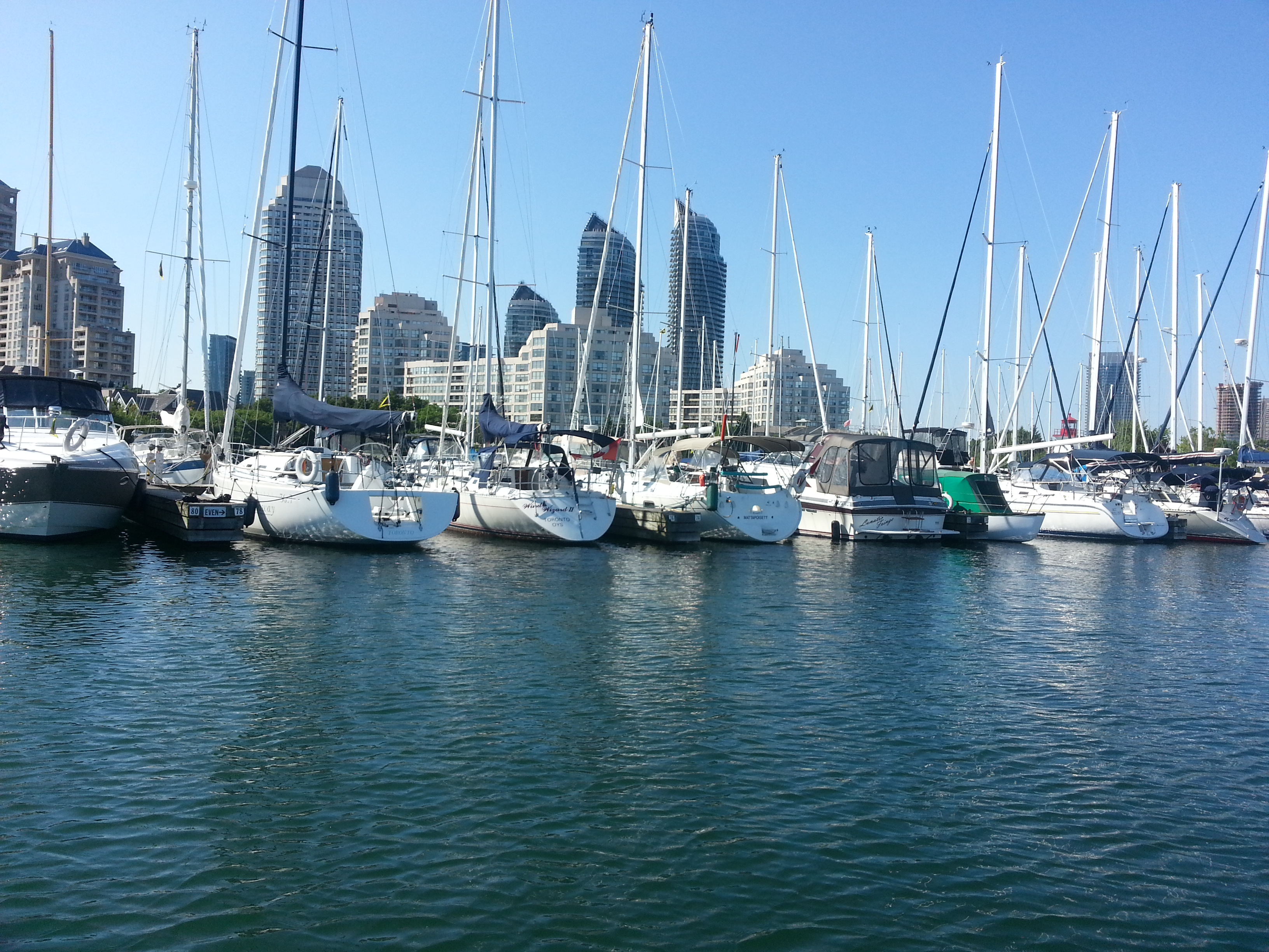 near Toronto Ontario Canada